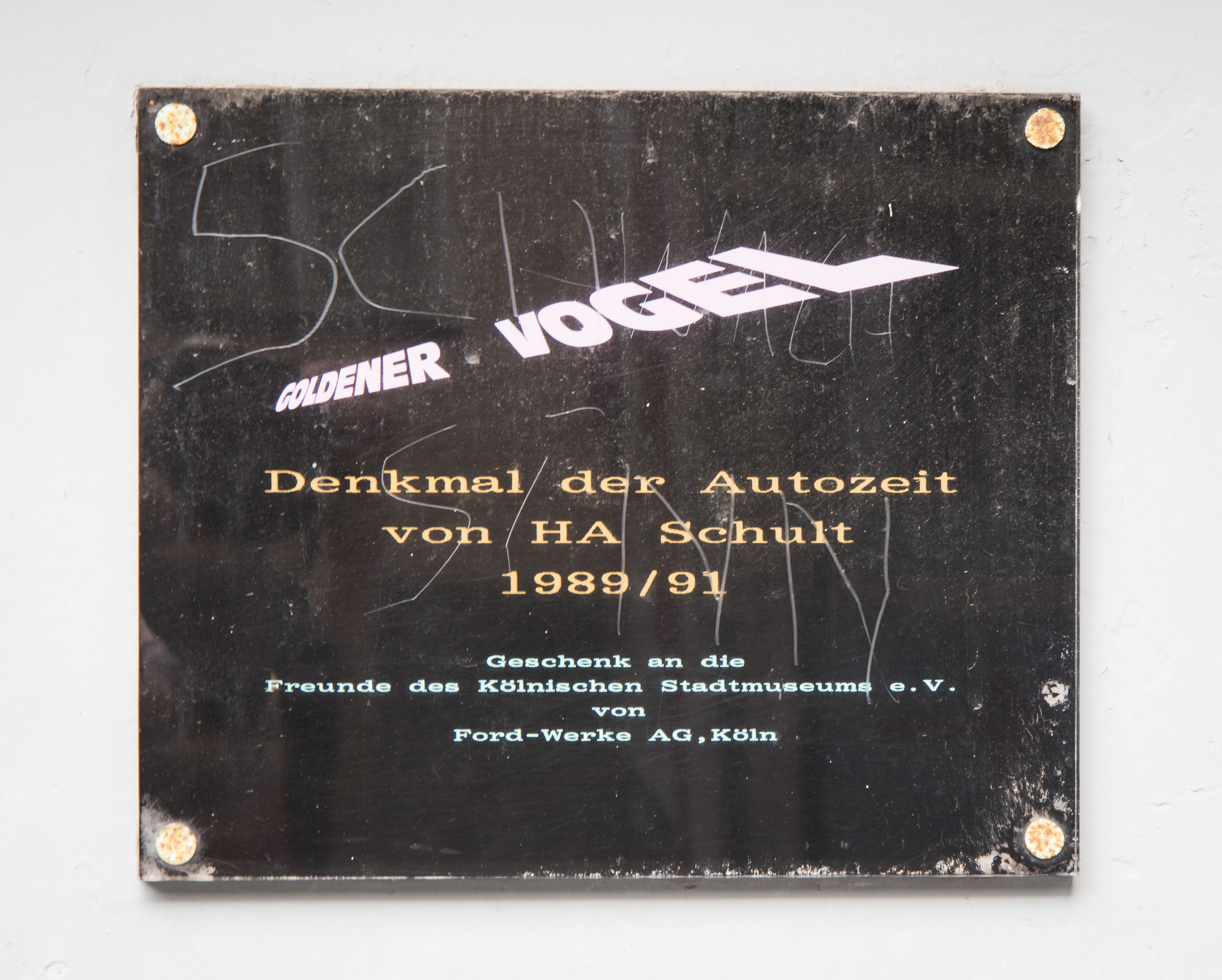 Schild am Zeugaus – Goldener Vogel von HA Schult 1989/1991, Geschenk an die Freunde des Kölnischen Stadtmuseums e.V. von Ford-Werke AG, Köln